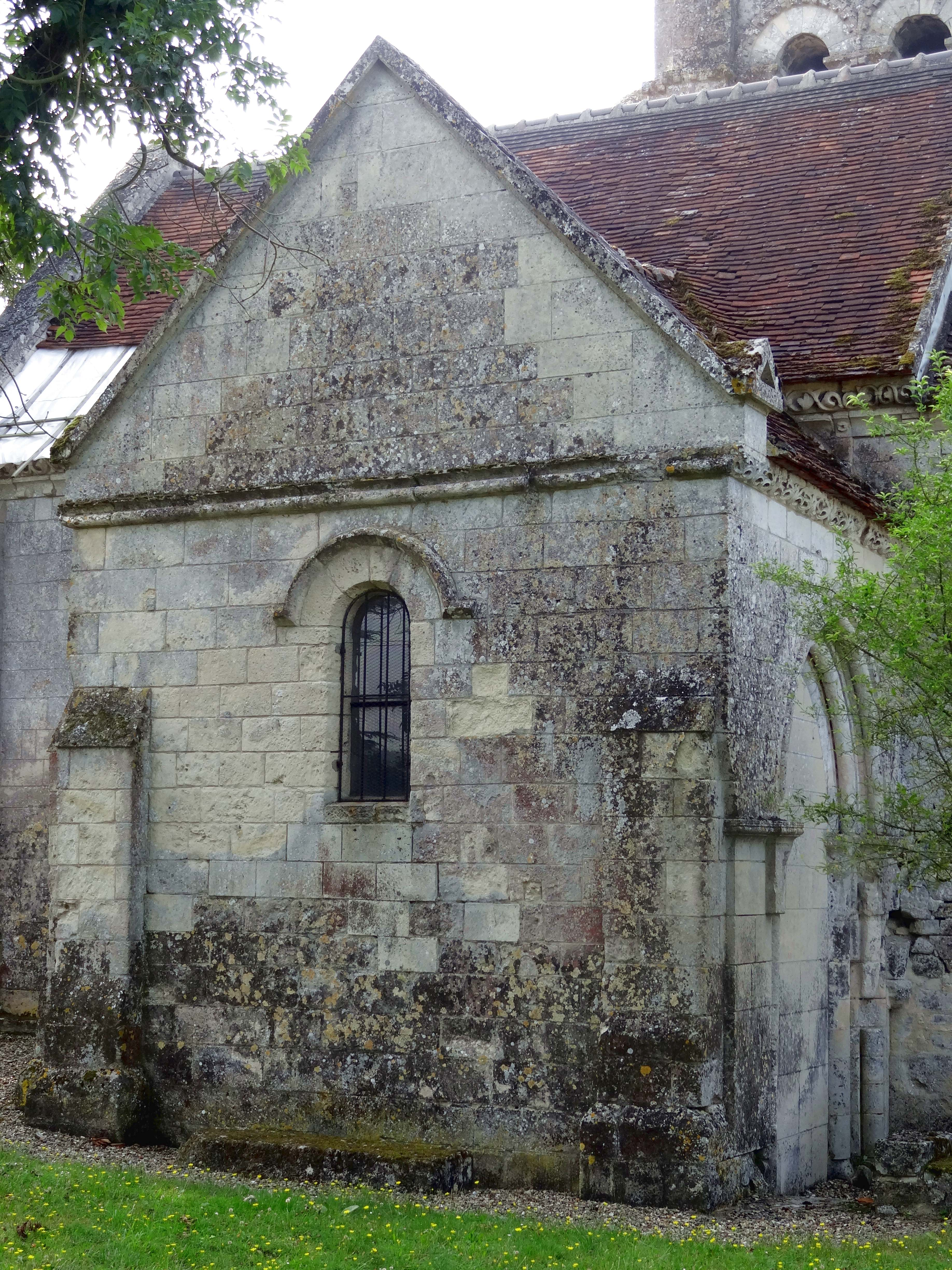 Église Saint-Martin de Noël-Saint-Martin - voir titre.